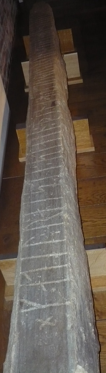 Runesteinen fra Mariakirken i Stavanger. I grunnmuren på kirken ble det i 1883 funnet en runestein av kvartsskifer. Steinen var i 1883 i fire deler. Den har en tekst som er tolket som: Kjetil reiste denne steinen etter sin kone Jorun Utyrmsdatter. Den dateres vanligvis til perioden 1000-1050, mesn Fridtjov Birkeli mente at den kunne være fra 900-tallet. Den er nå i Arkeologisk Museum, Universitetet i Stavanger. Bildet er tatt da den var utstilt.